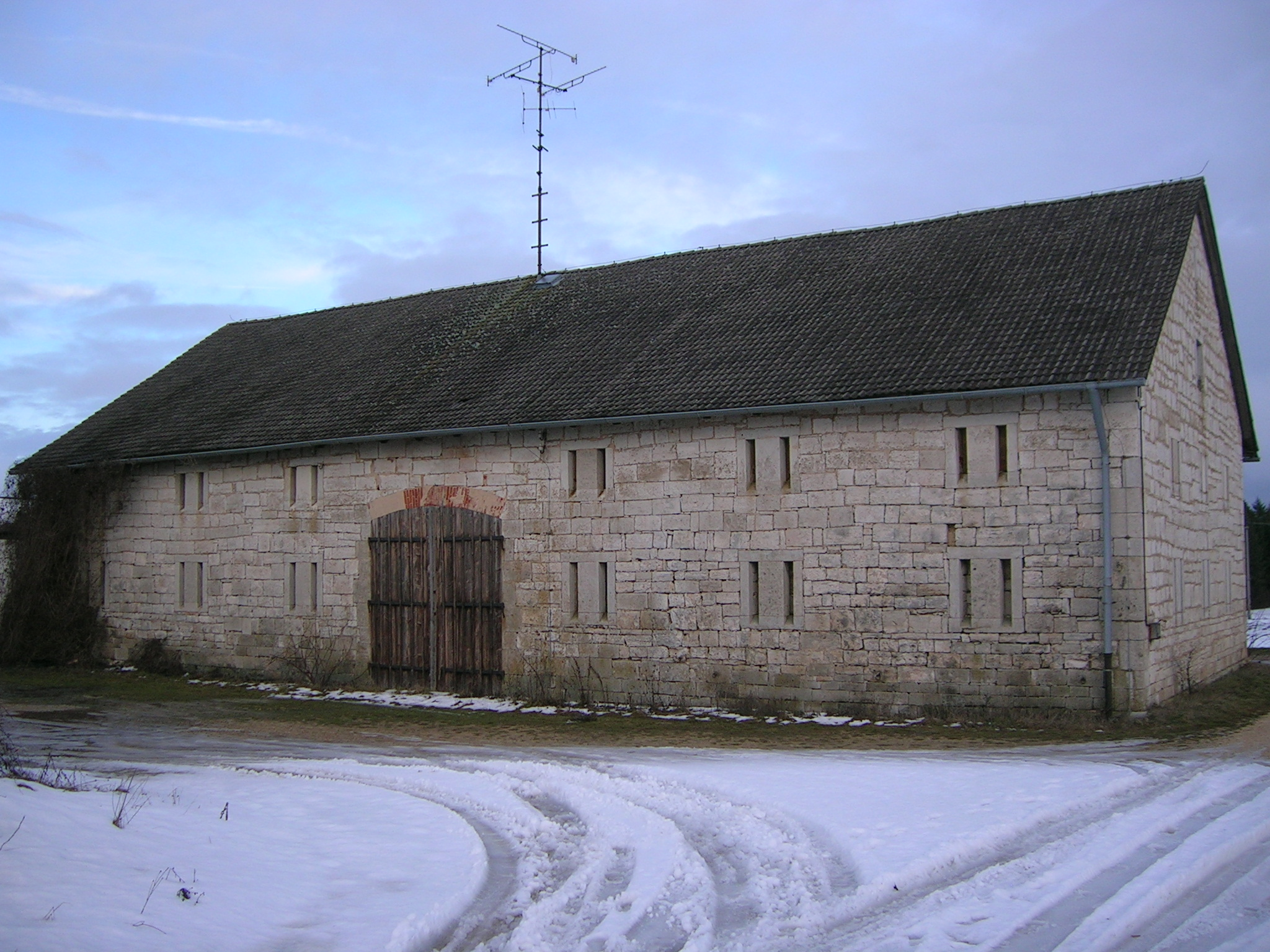 Feldscheune an der Kinderdorfstraße, Eichstätt